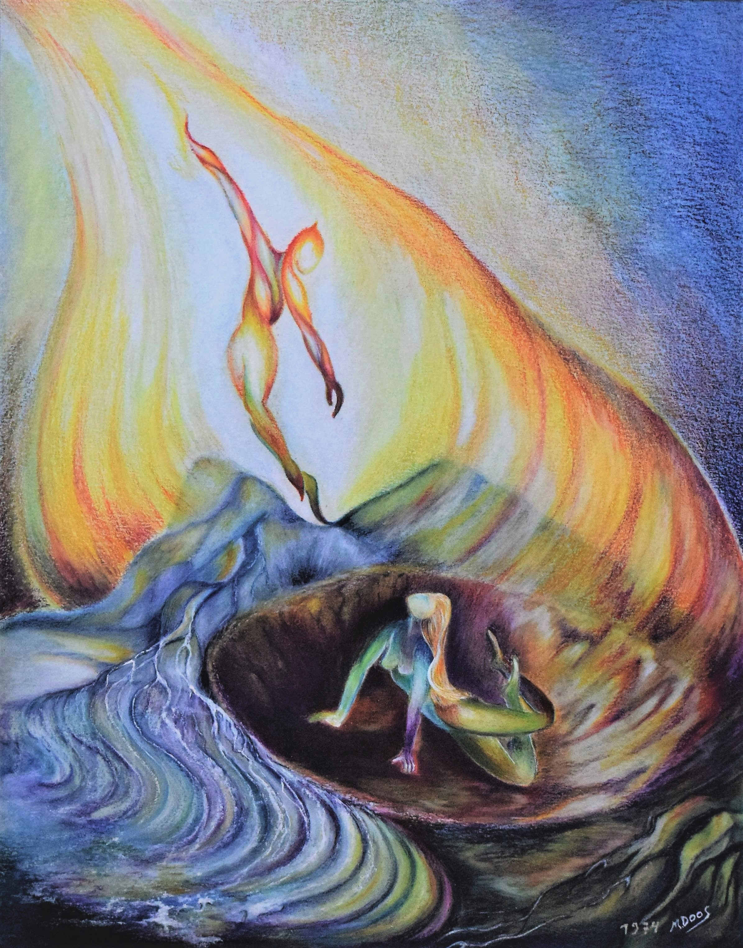 Ce dessin figure les préoccupations de Martine Doos concernant le passage vers l'Au-delà.